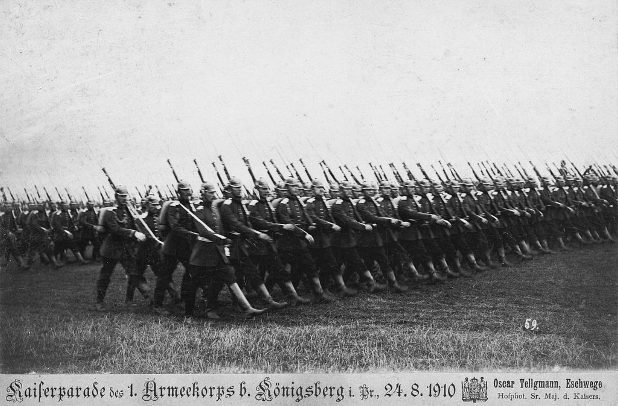 Kaiserparade bei Königsberg